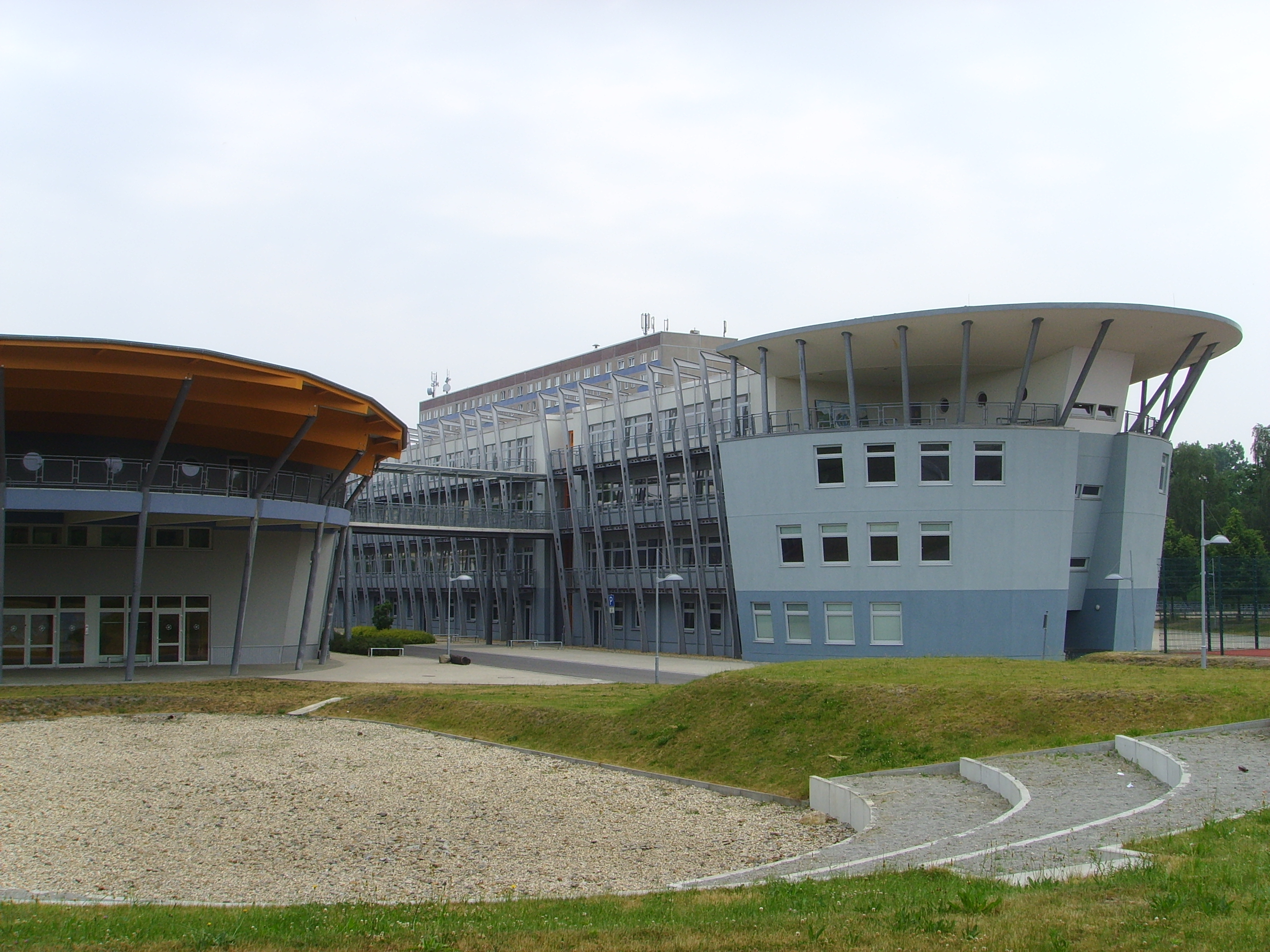 Das Senftenberger Gymnasium Friedrich Engels (rechts) und die Turnhalle (links)